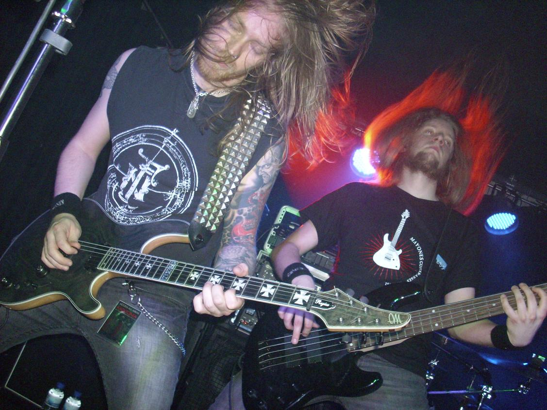 Sala Ramdall Madrid , 19 Marzo 2010